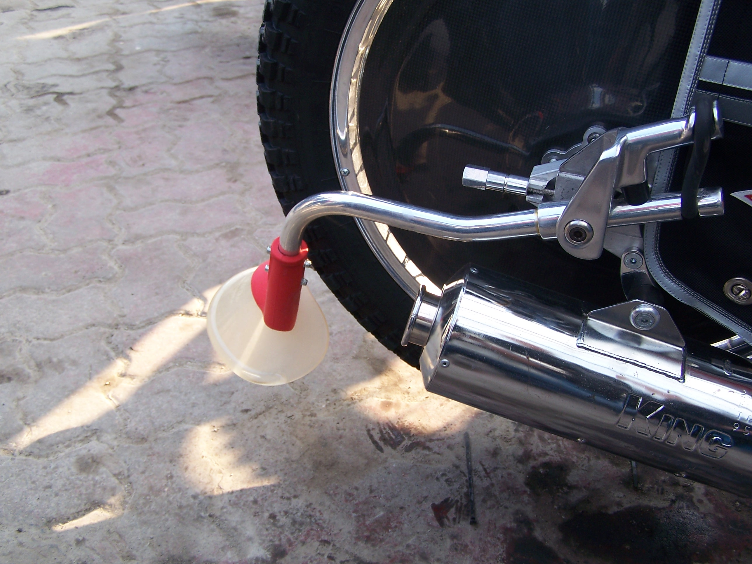 Deflektor przy motocyklu Andreasa Jonssona